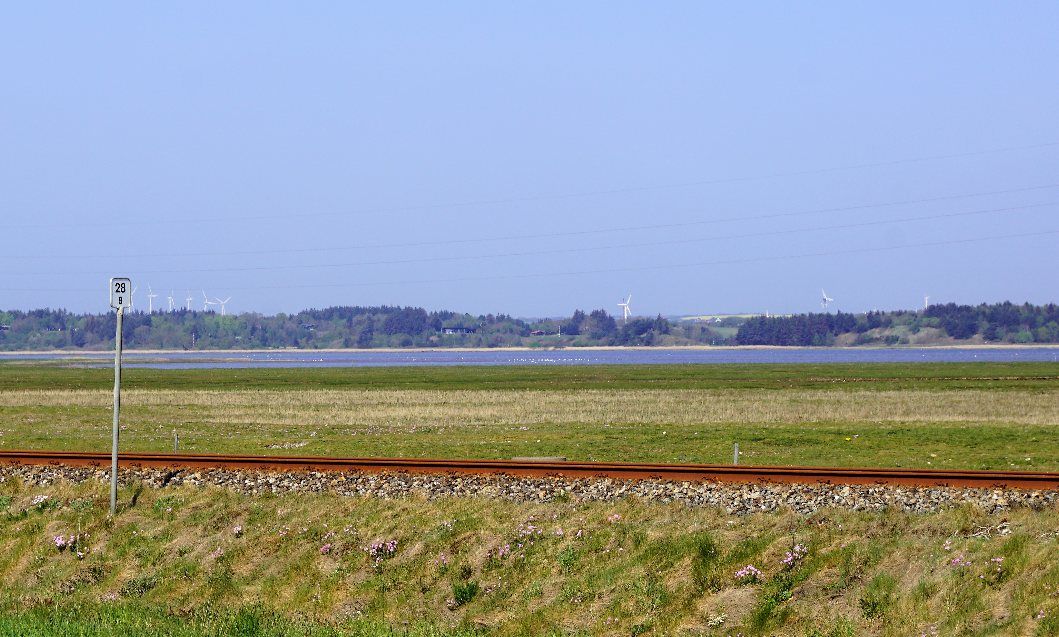 Skibsted Fjord set fra Sydvest